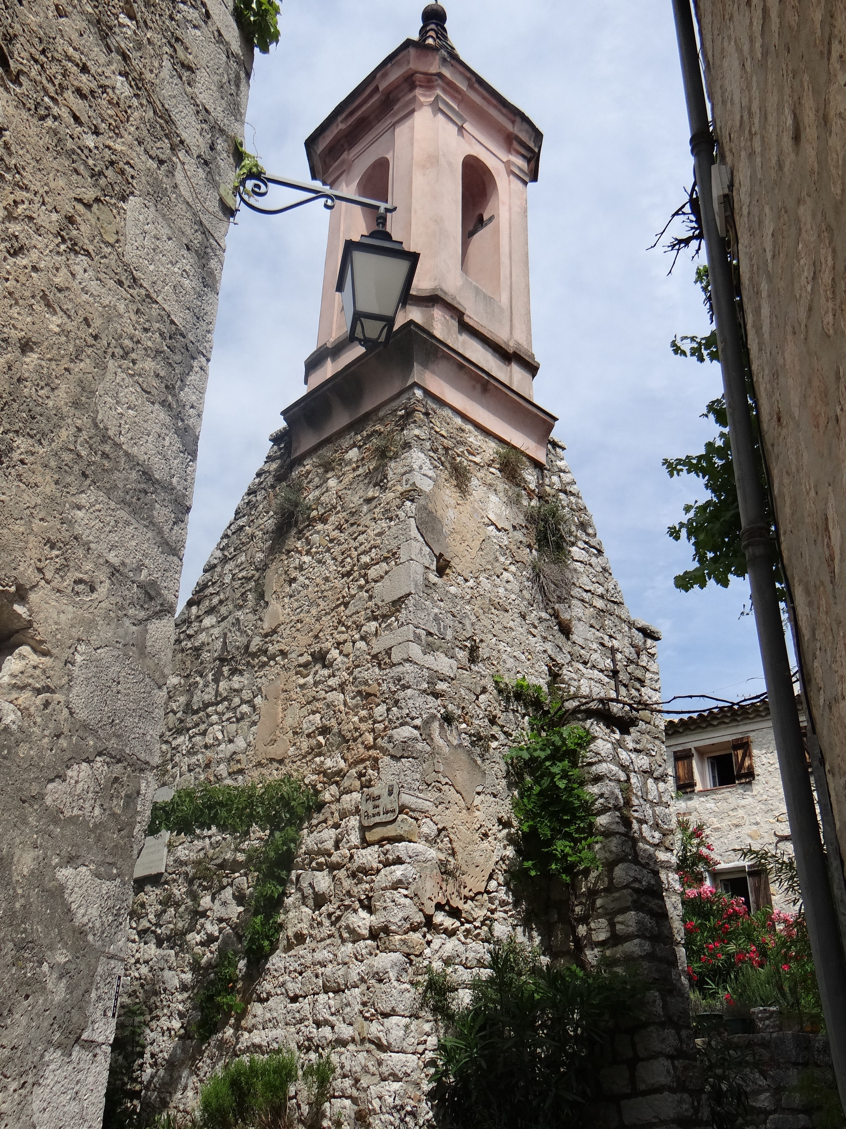 Tourrette-Levens - Chapelle des Pénitents blancs - Vestiges vues de la montée au château